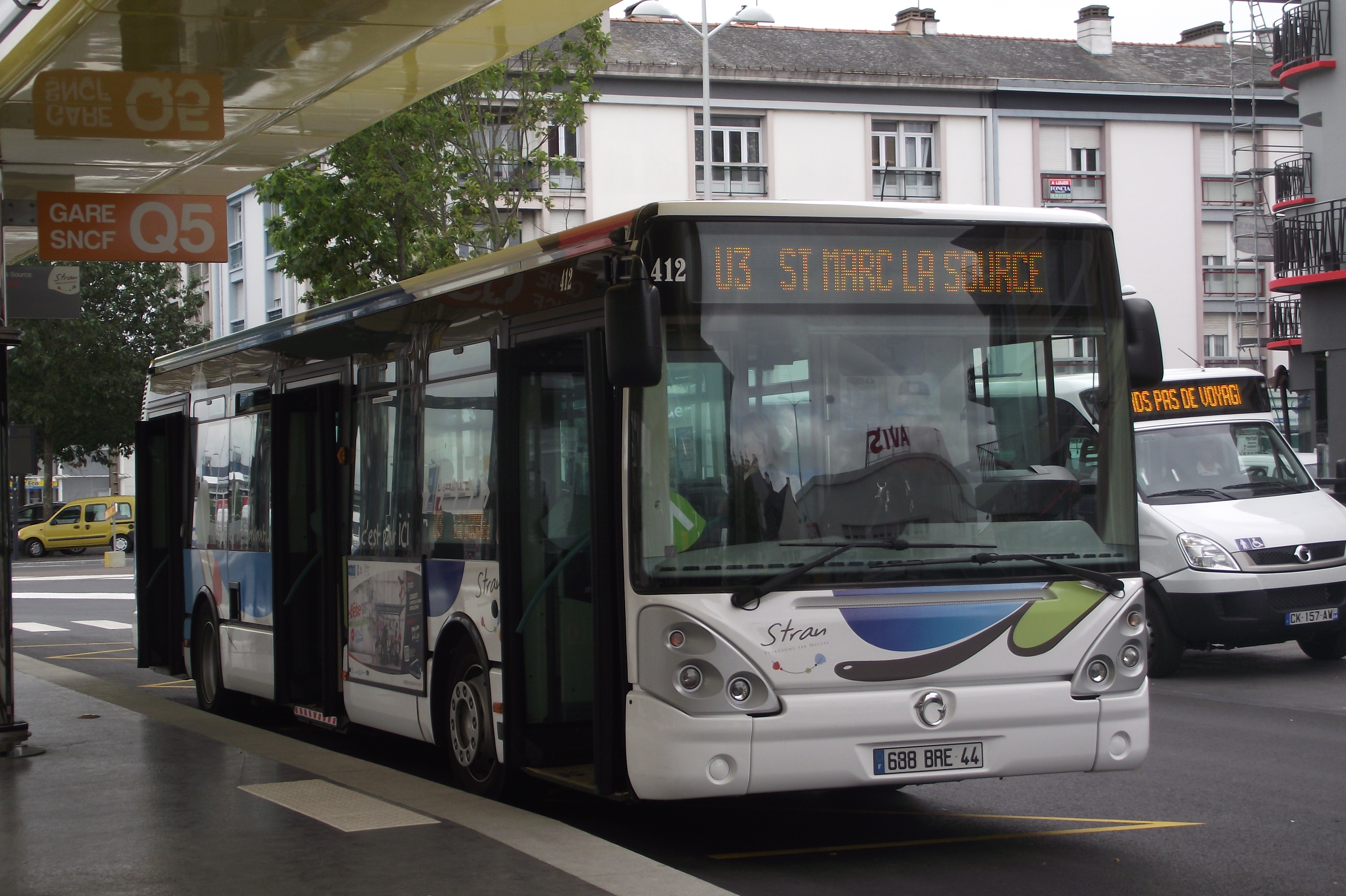 Citelis 12 à la gare SNCF de St Nazaire sur la ligne U3 à destination de Saint-Marc la Source